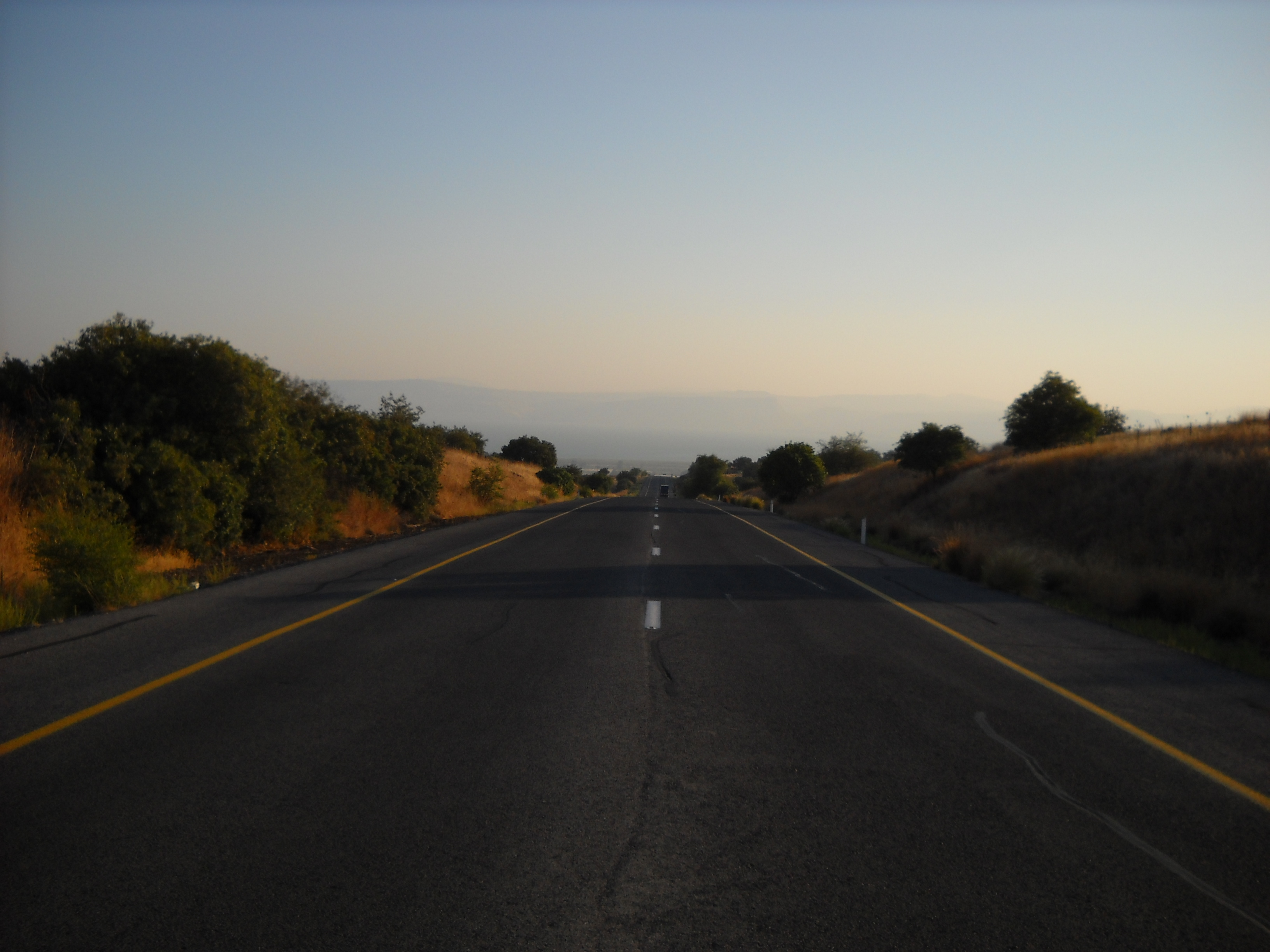 כביש 87, מבט מערבה לכיוון הכינרת. צולם בגובה פני הים.